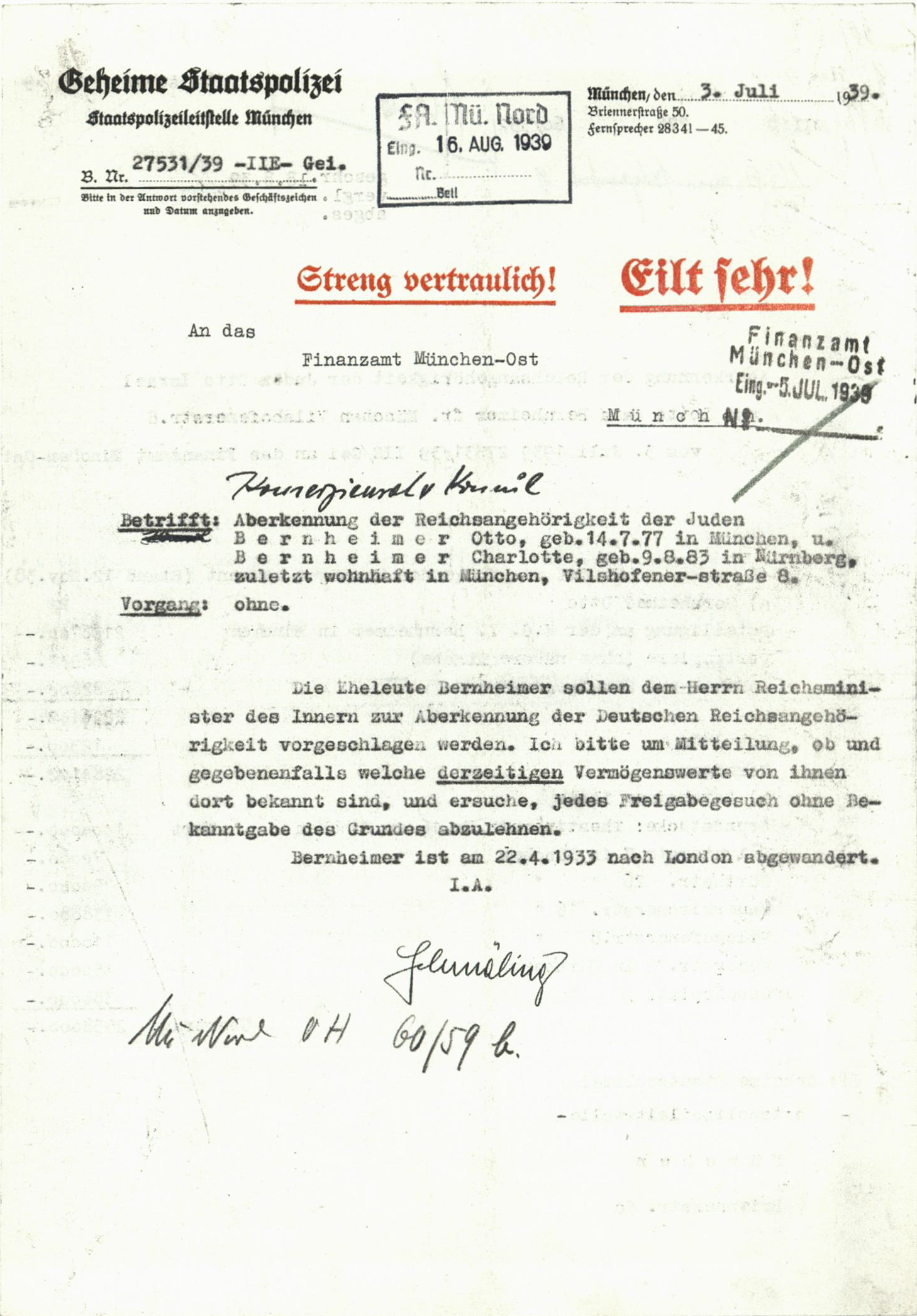 Gestapo-Akte, betreffend die Aberkennung der Reichsangehörigkeit von Otto Bernheimer (Geb. 14. 7. 1877)